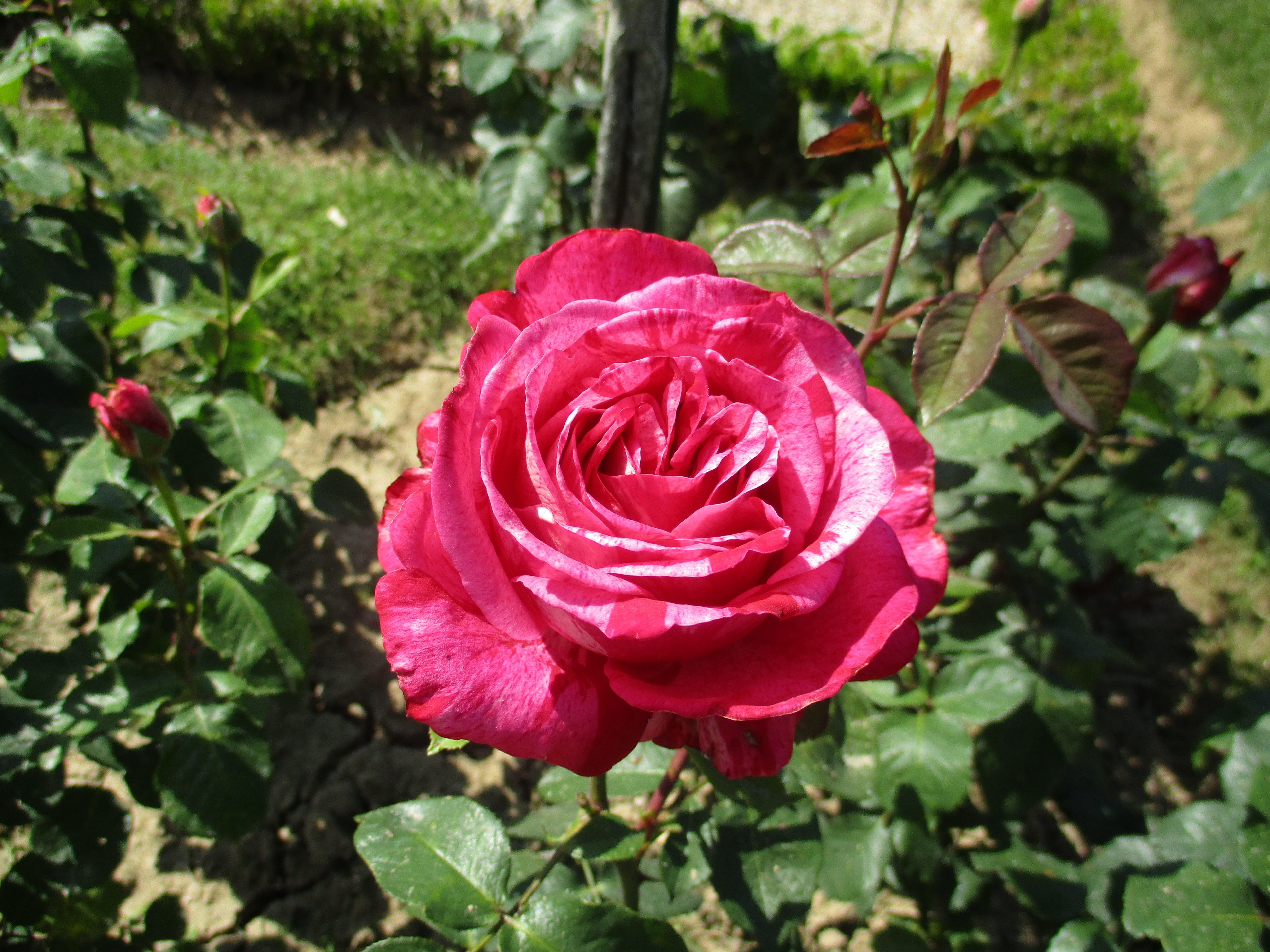 Rose 'Brigitte Bardot' (Joseph Orard, France, 1994). Roseraie de Bagatelle.